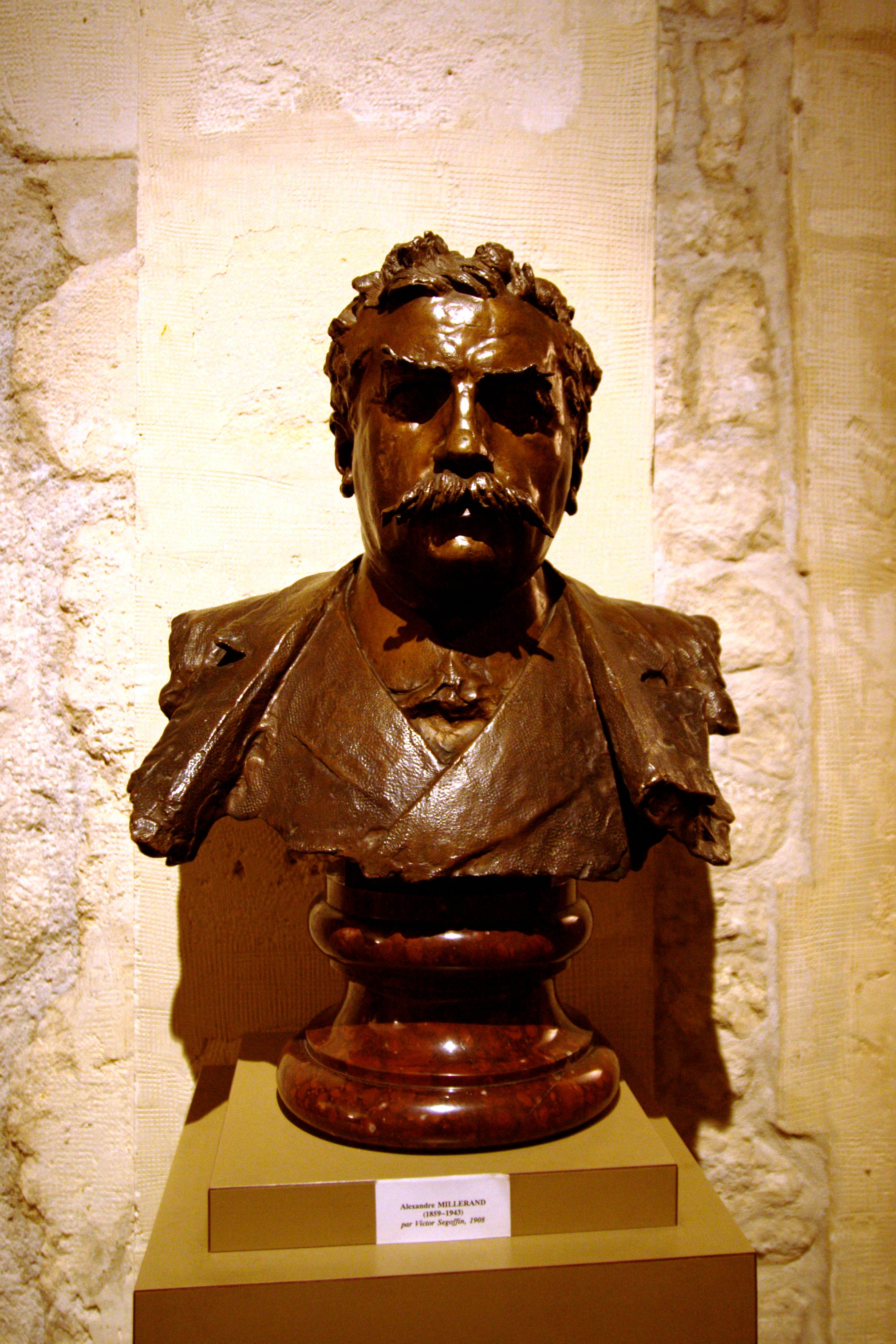 Musée du Barreau de Paris (dans l'hôtel de La Porte) : buste d'Alexandre Millerand, créé en 1908 par Victor Segoffin